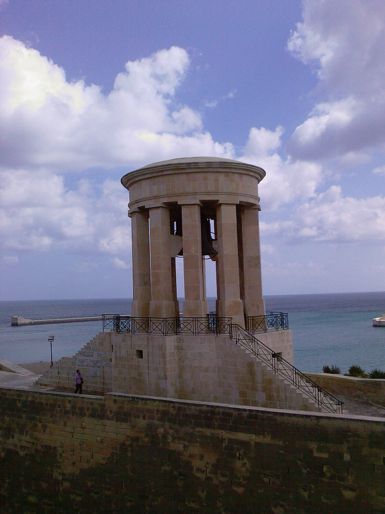 Monumento ai caduti a La Valletta